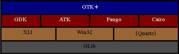 هذه المخطط يصف بنية جتك+ ومكوناتها